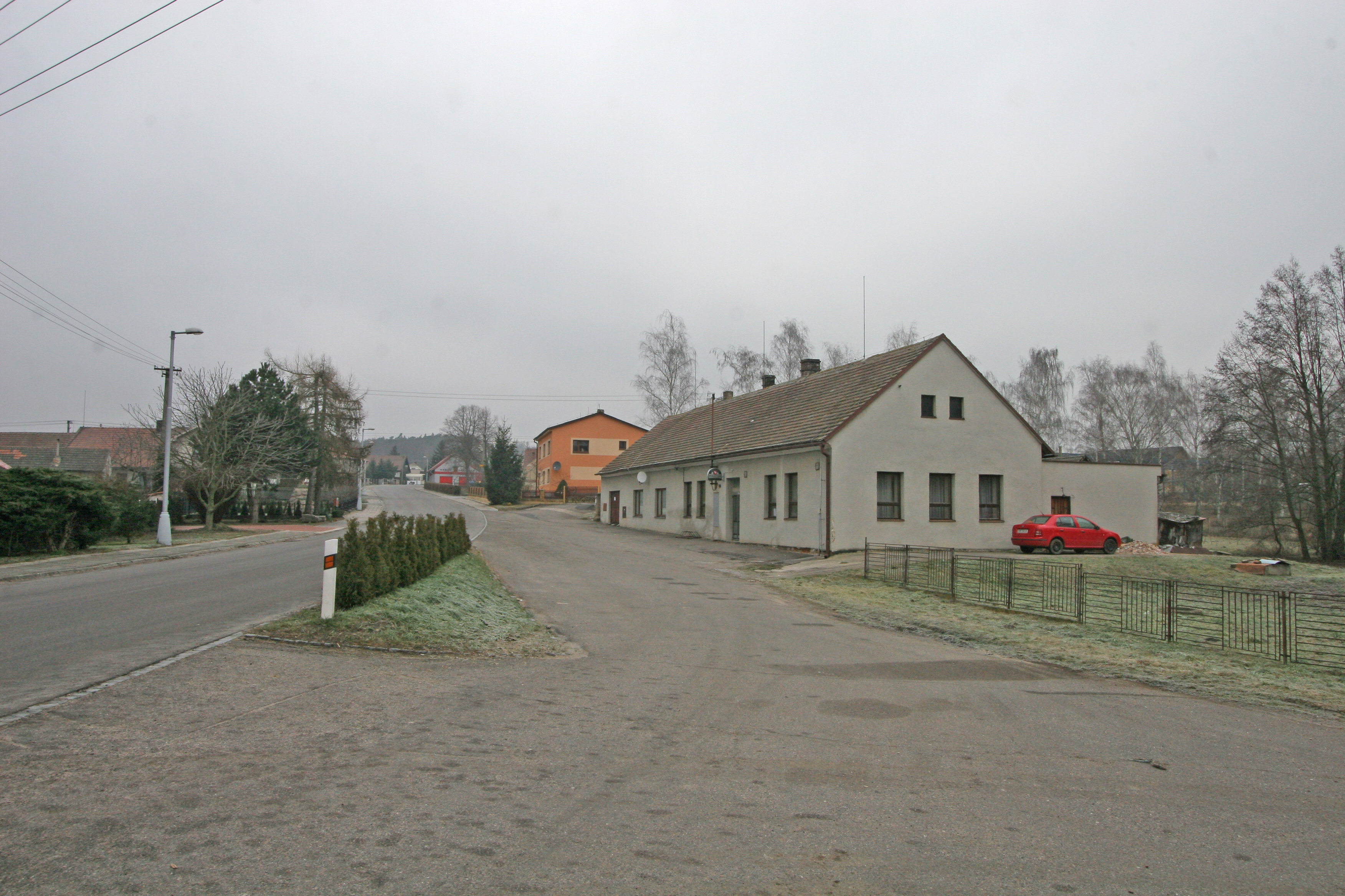 Žáravice čp. 19